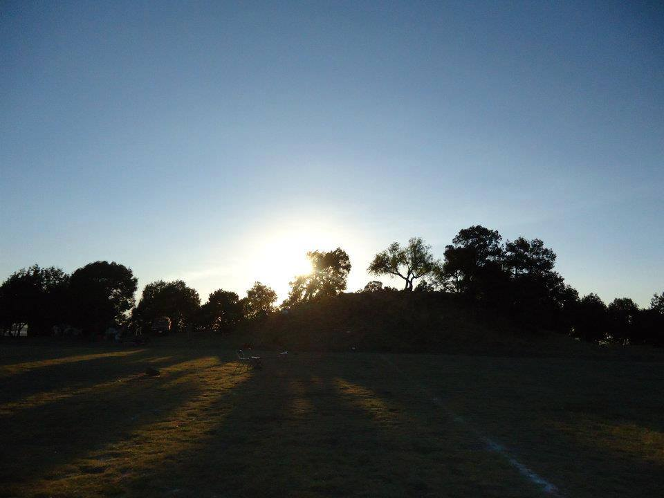 Metztepel o Cerro de la LUna